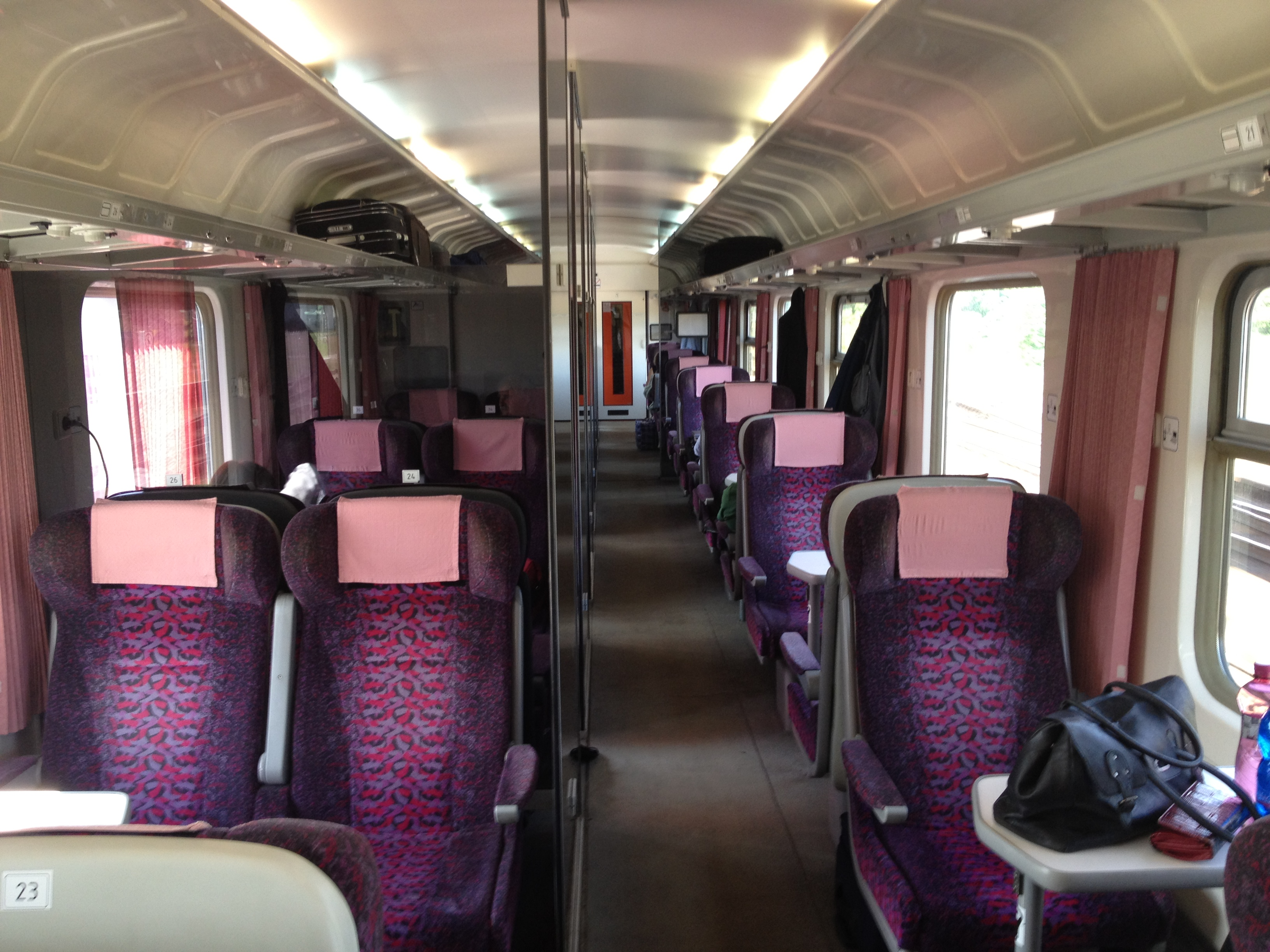 Vozeň Apeer ZSSK